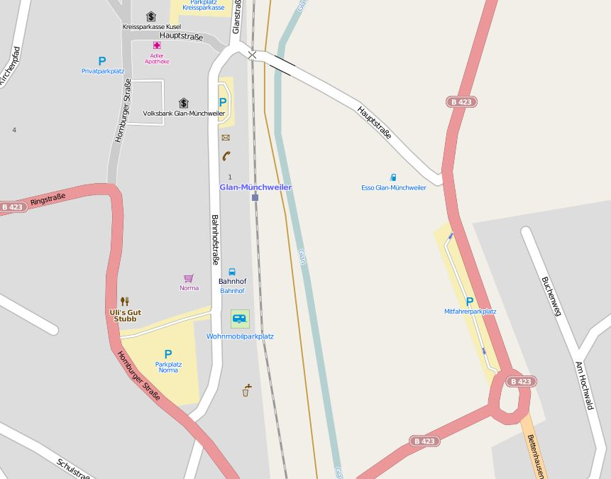 Umgebungskarte des Bahnhofes Glan-Münchweiler This map may be incomplete, and may contain errors. Don't rely solely on it for navigation.